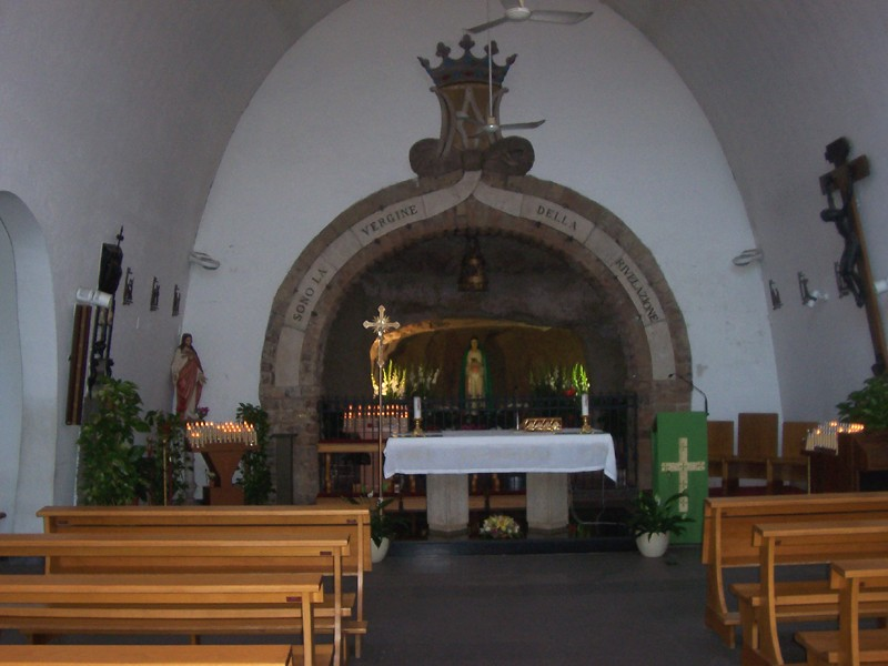 Roma - Grotta - Santuario della Madonna della Rivelazione